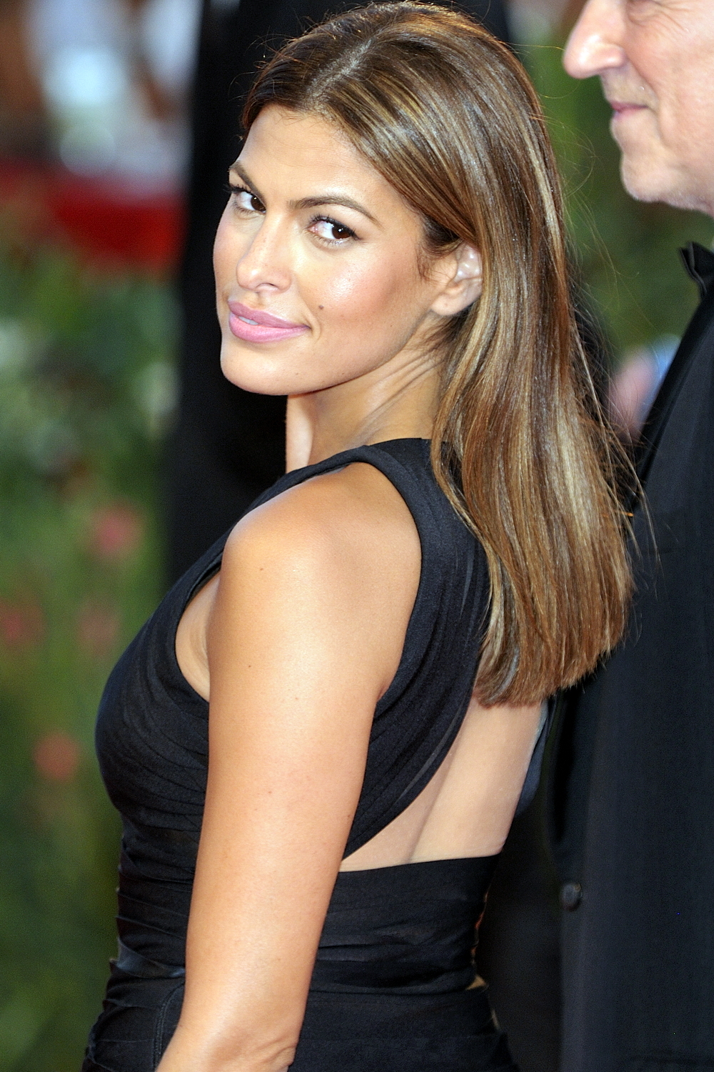 66ème Festival de Venise (Mostra) Eva Mendès